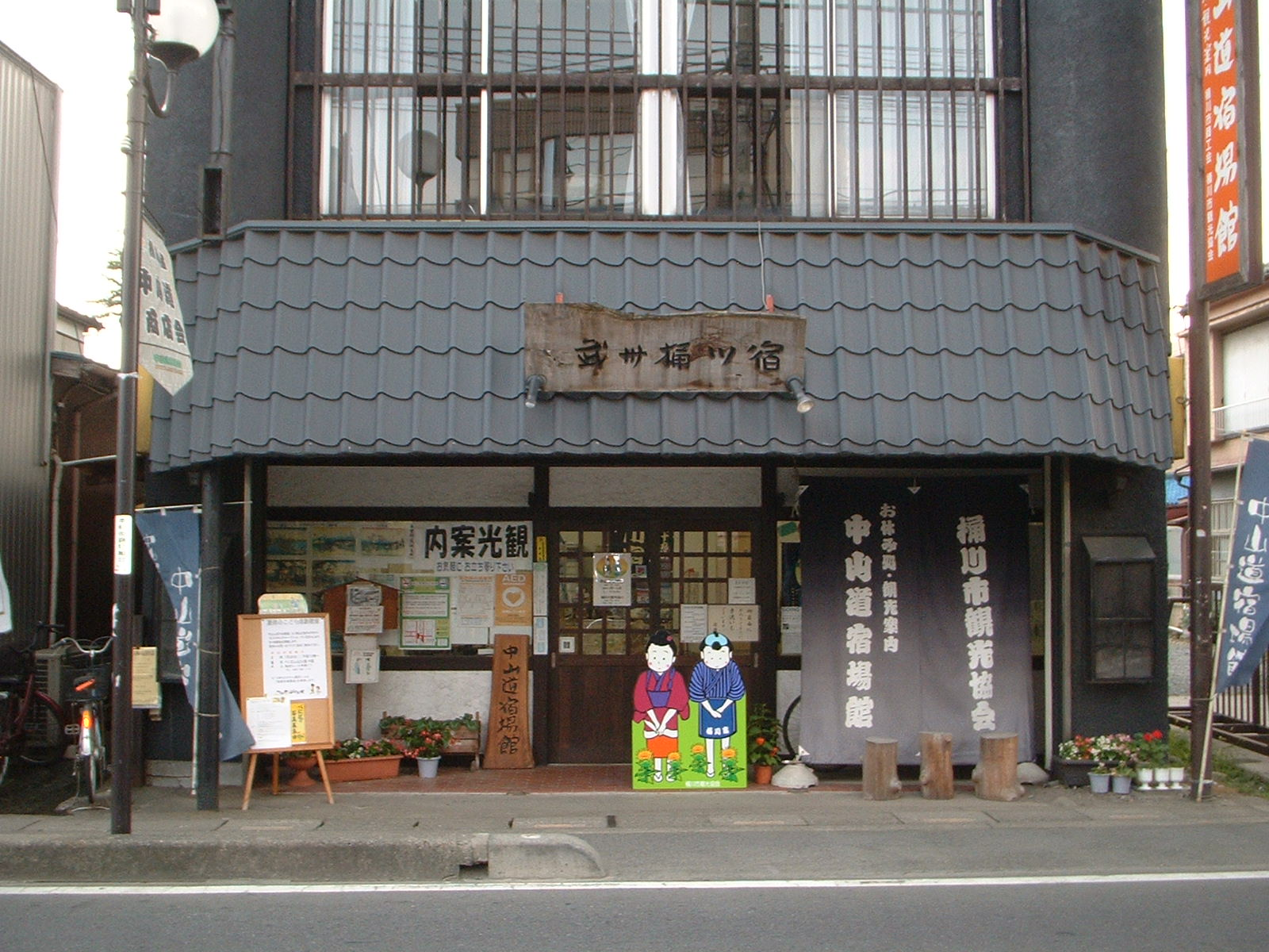 ここでは観光案内や休憩所の提供をしてもらえる